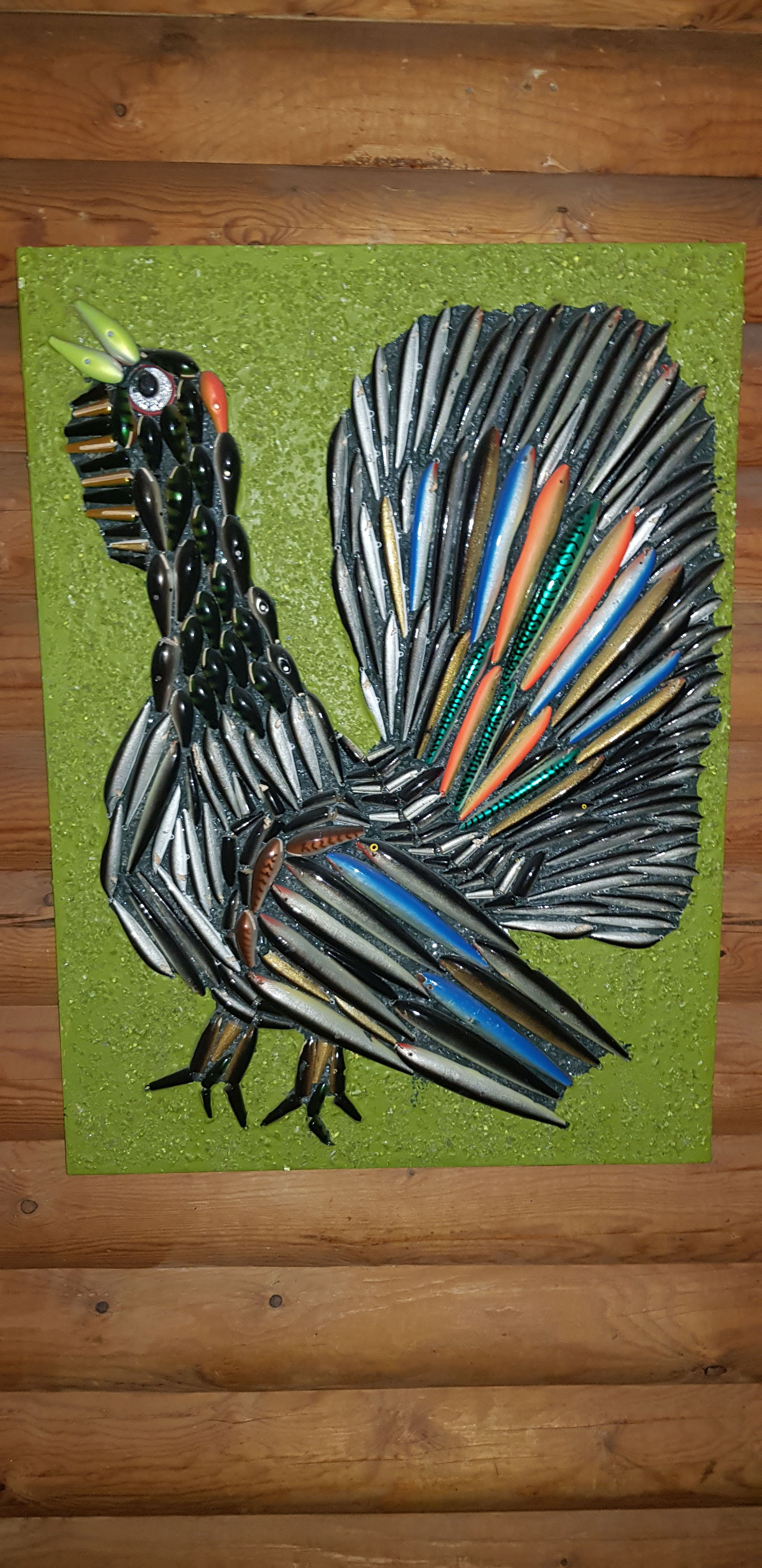 Tjädertavla gjord av fiskdrag av Voitto Salmela